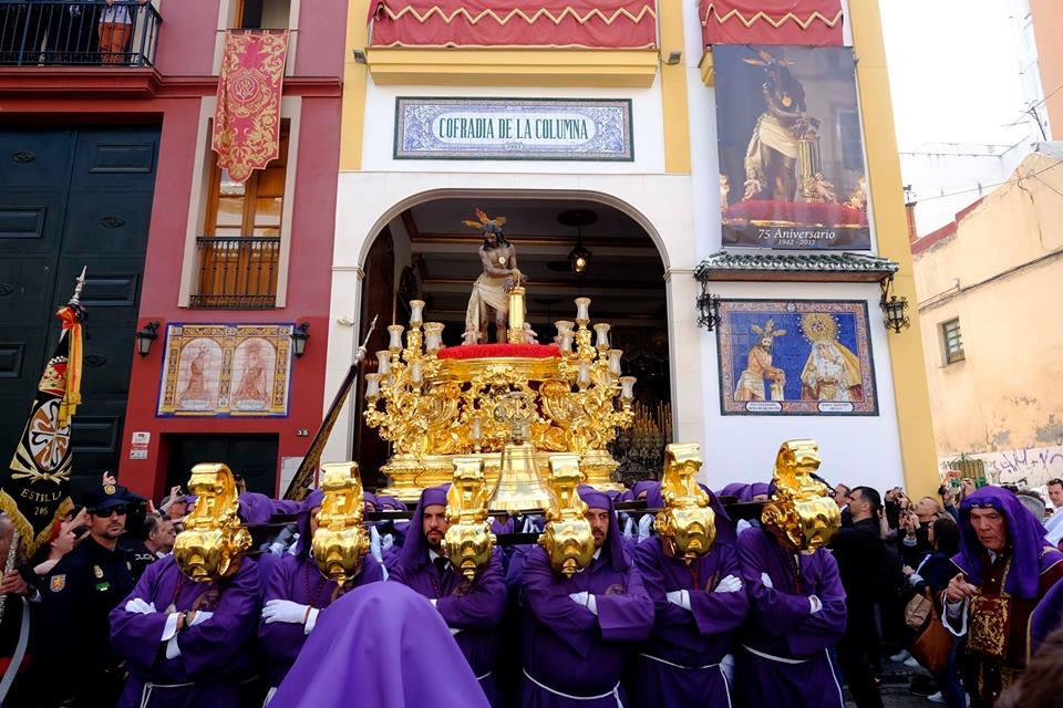 Señor de la Columna realizada por Juan Vargas Cortés, para la Cofradía de Gitanos (Málaga)